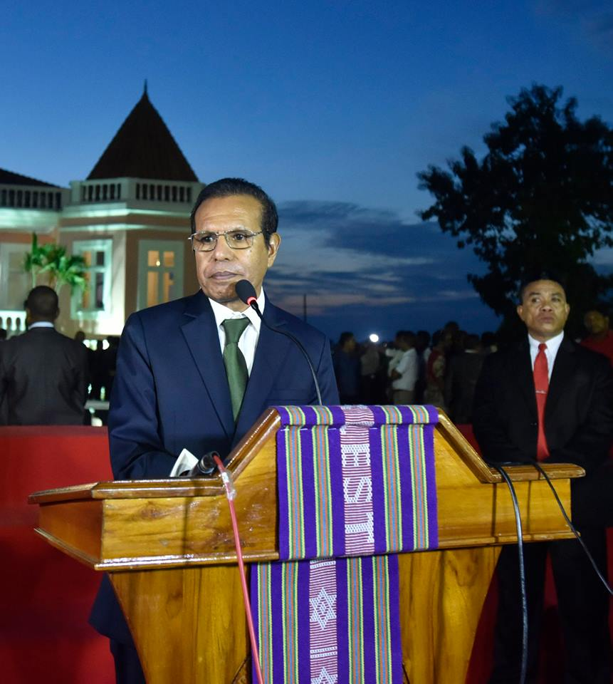 Premierminister Taur Matan Ruak vor dem Palácio de Lahane